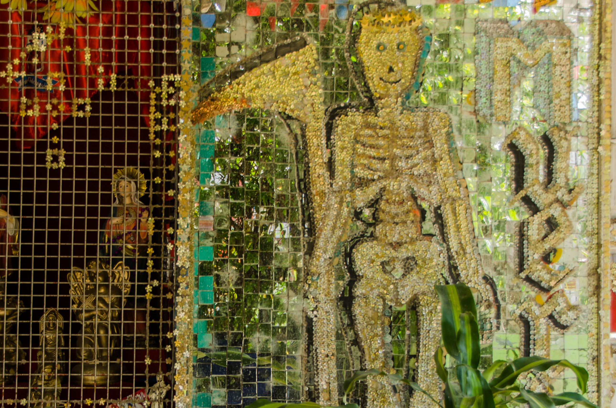 Santuario de San La Muerte en Colón 1260. Fte.: Lucas Tissera (2017)